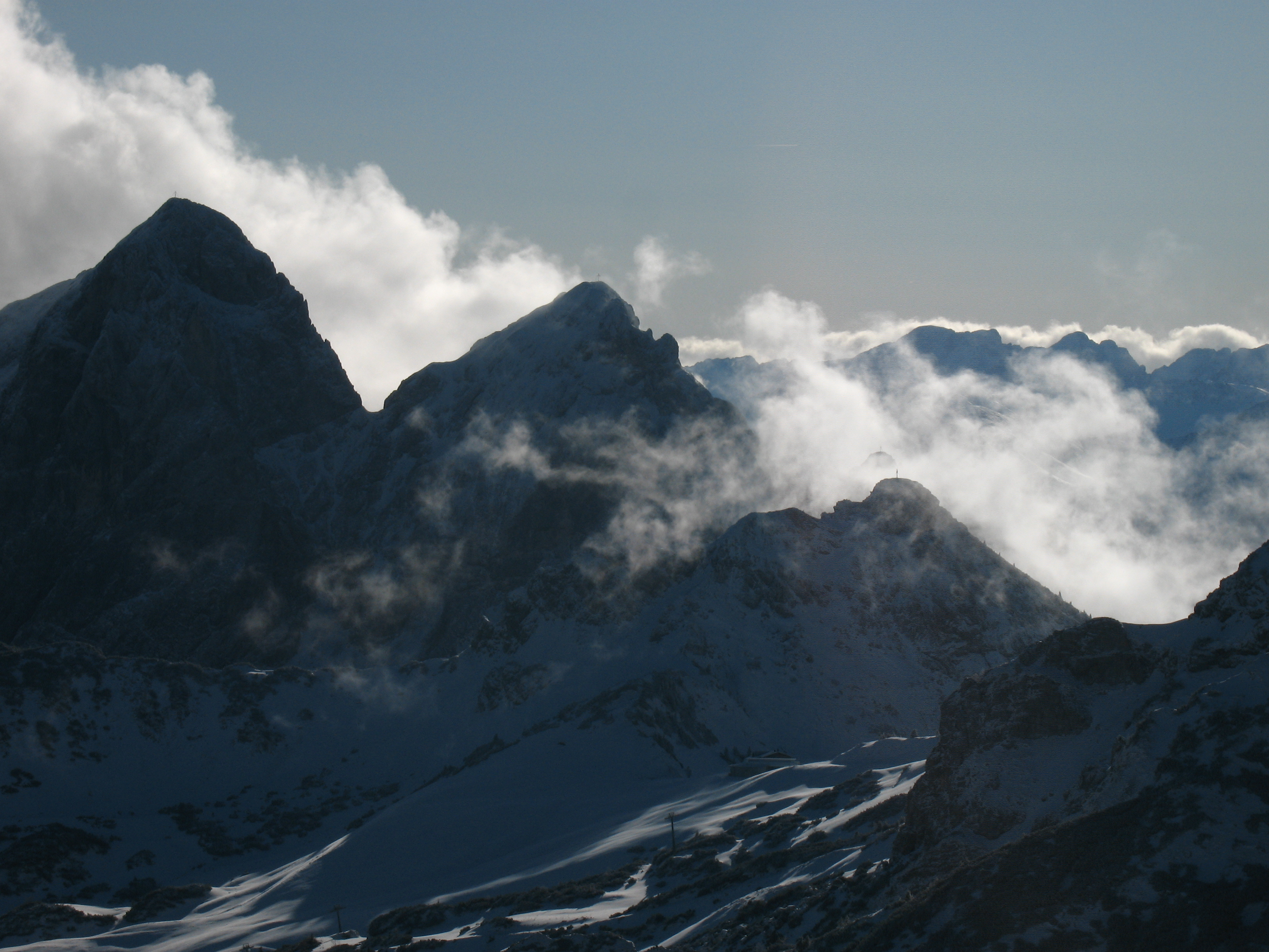 Gimpel (2173 m), Rote Flüh (2108 m), Schartschrofen (1968 m) und Läuferspitze (1956 m) über dem Skigebiet Füssener Jöchl vom Brentenjoch gesehen.